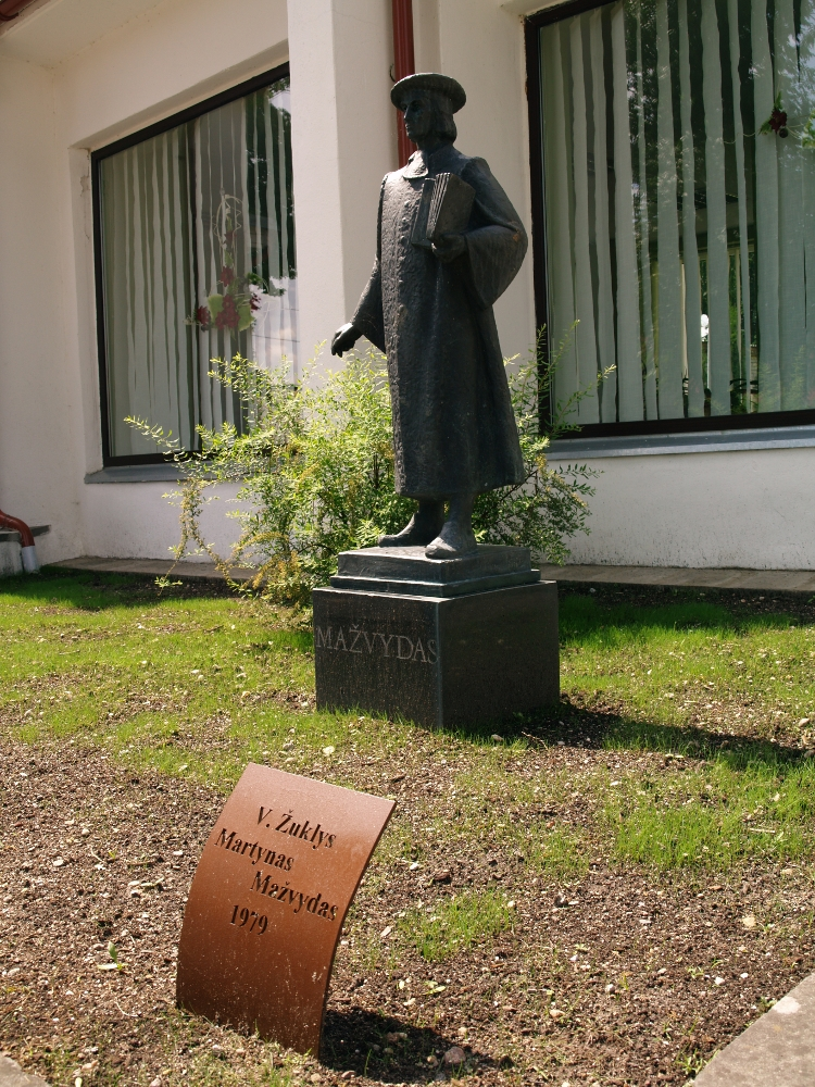 Birštono paminklas Martynui Mažvydui